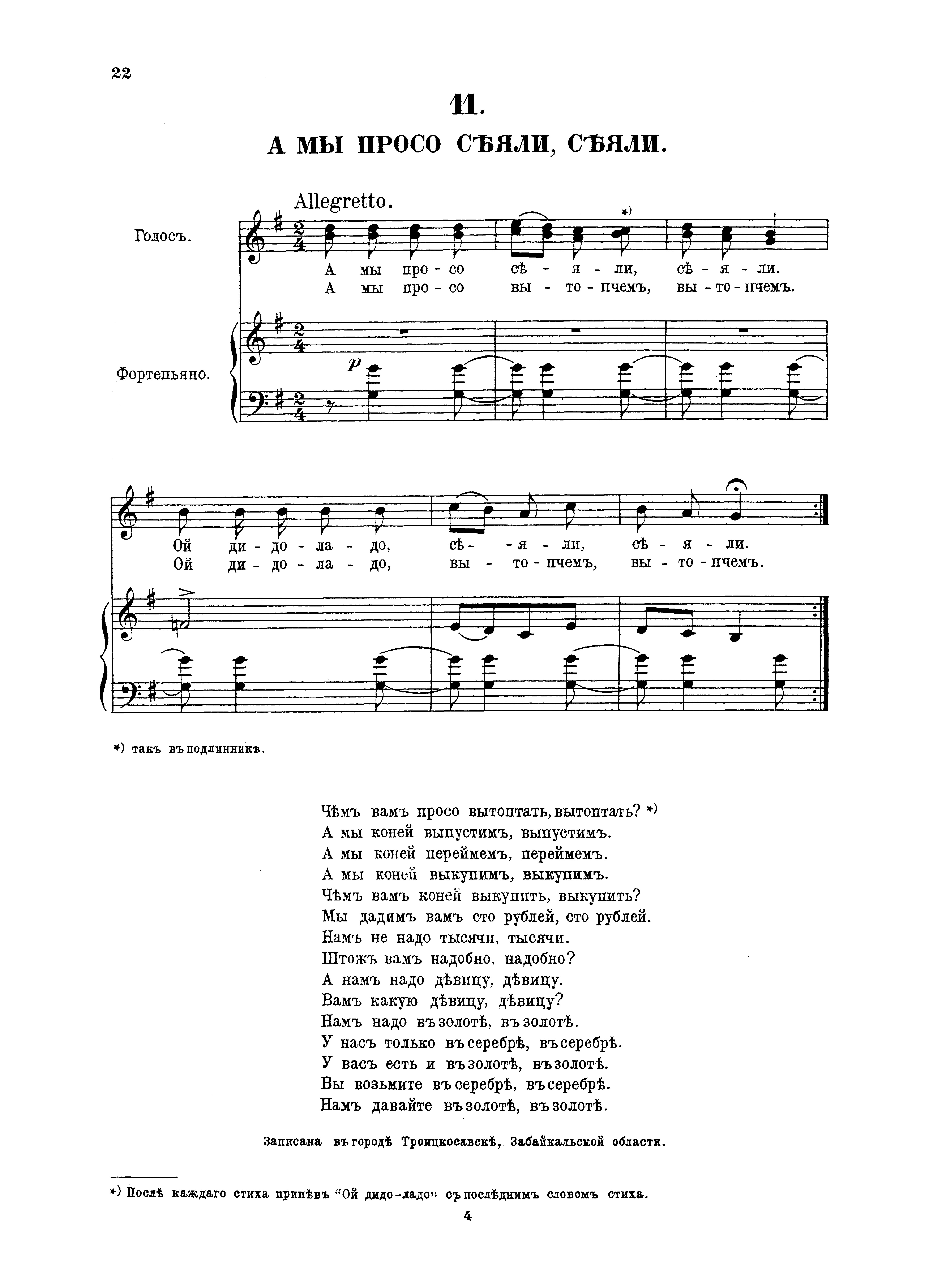 Из книги «20 народных песен Сибири для одного голоса с сопровождением фортепьяно из собранных в 1900 г. в Иркутской губернии и Забайкальской области Н.П. Протасовым. Переложил Алексей Петров. Издано с Высочайшаго соизволения Песенною комиссиею Императорскаго Русскаго Географическаго Общества»